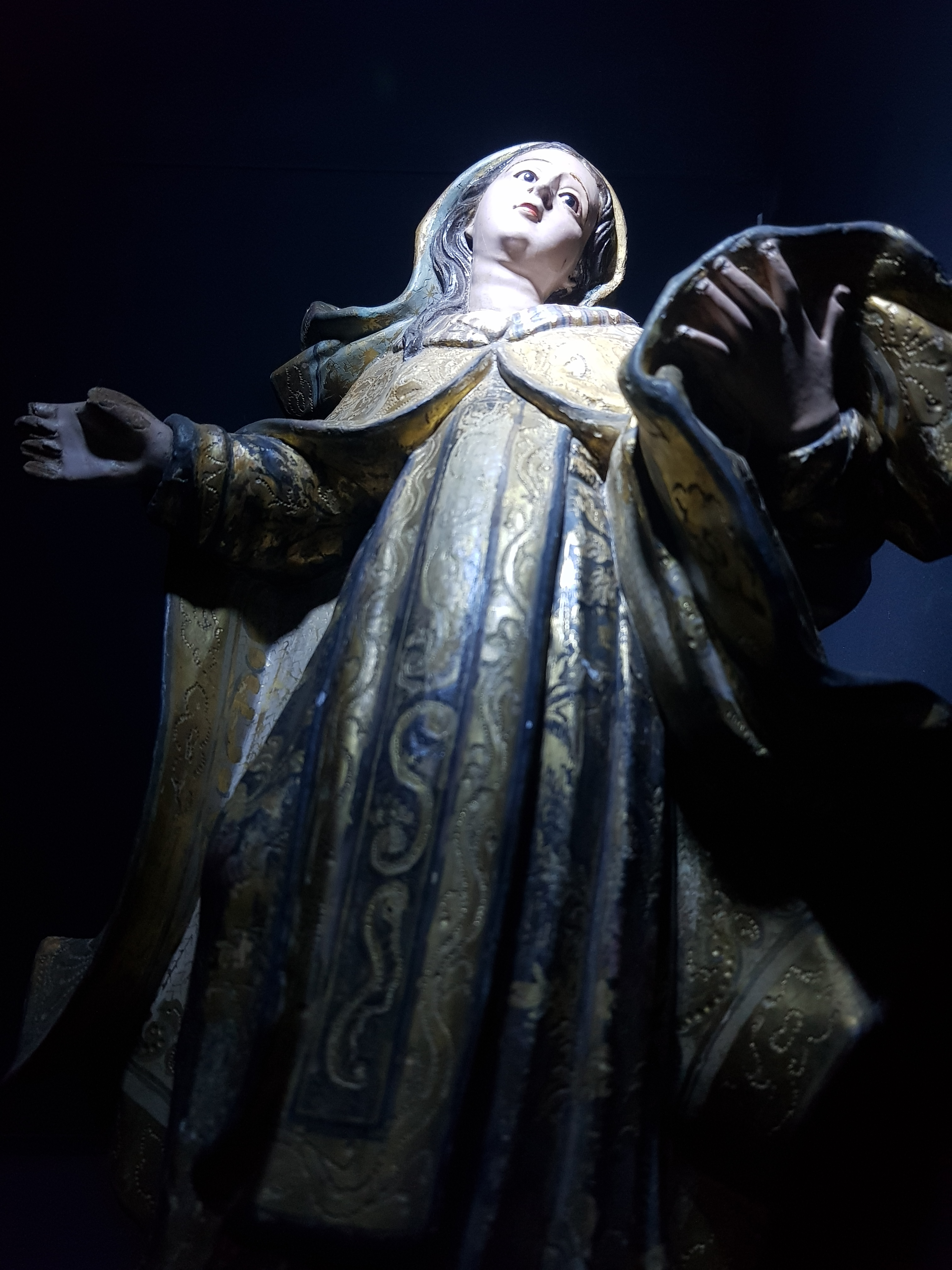 Imagem de Nossa Senhora das Mercês no Museu Sacro São José de Ribamar. Madeira esculpida, dourada e pintada em diversas cores. Século XVIII.